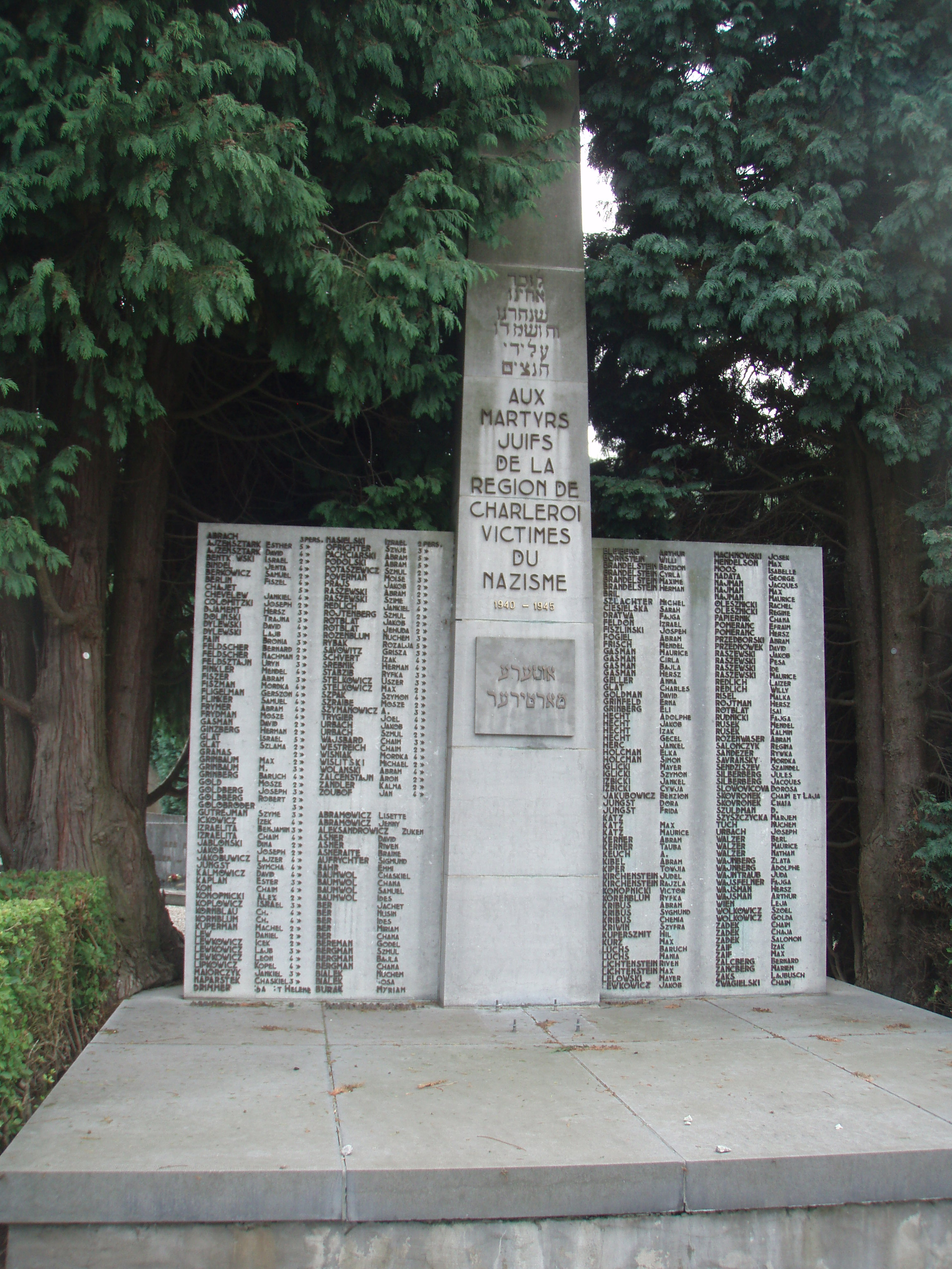 Le deuil et le dénuement attendent les rescapés juifs qui sortent de leurs caches en 1944. La Libération ne sera pas toujours, tant s'en faut, synonyme de délivrance.